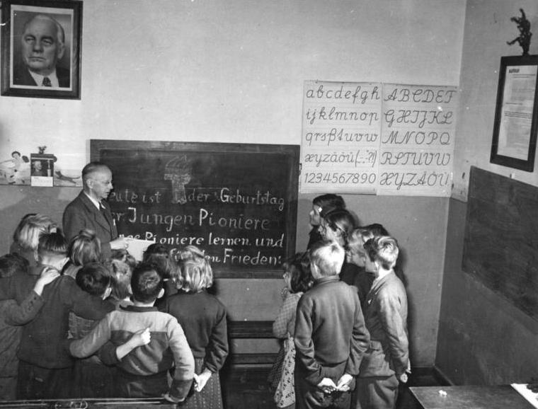 Hohendorf, JP mit Dorflehrer Hohendorf - "Dorf des Friedens". Die Gemeinde Hohendorf, Krs. Luckau, hat sich durch gute Aufklärungsarbeit und ständige Erfüllung ihrer Ablieferungspflicht zu einer vorbildlichen Gemeinde der DDR entwickelt. Durch enge Zusammenarbeit der Bauern mit der Gemeindeverwaltung war es möglich, alle auftretenden Schwierigkeiten zu überwinden und dadurch anderen Gemeinden ein gutes Bespiel zu geben. A, 5. Dezember wurde Hohendorf vom Landesfriedenskomitee Brandenburg als "Dorf des Friedens" ausgezeichnet. Stolz und glücklich waren die Bauern, als im Dorf ein Brief des Präsidenten Wilhelm Pieck eintraf, der eine Delegation nach Berlin einlud. Bei ihren Besuch in Berlin, der für alle ein unvergessliches Erlebnis war, konnten sie wertvolle Ratschläge des Präsidenten für ihre weitere Arbeit mitnehmen. Um auch am Neuaufbau Berlins mitzuhelfen, verpflichteten sie sich, 41 Baumstämme zur Verfügung zu stellen. UBz: In der Dorfschule von Hohendorf wird gute Pionierarbeit geleistet. Lehrer Wohlauf erzählt den jungen Pionieren von der Bedeutung des 3. Jahrestages der jungen Pioniere.